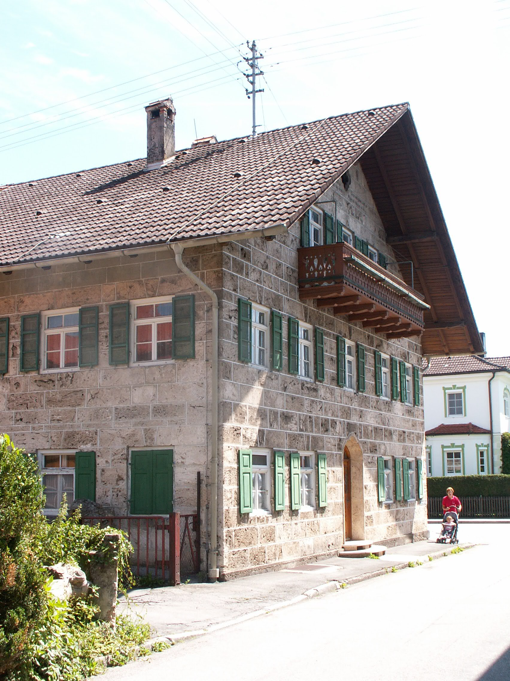 Typisches Anwesen in Antdorf